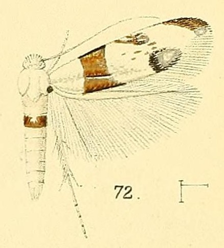 Micropostega aeneofasciata